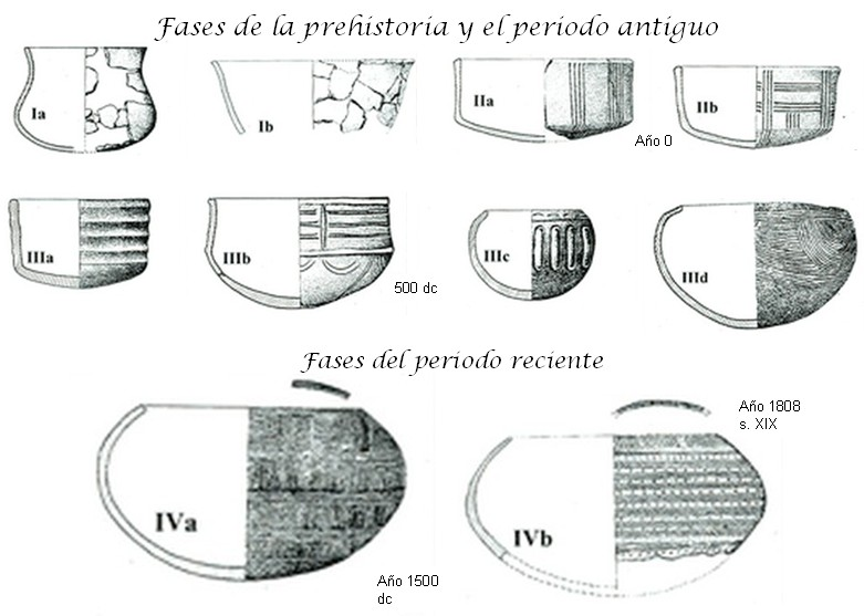 Cronología de las fases evolutivas de la alfarería precolombina benahoarita o auarita de los pobladores aborígenes de la isla de La Palma, en Canarias.